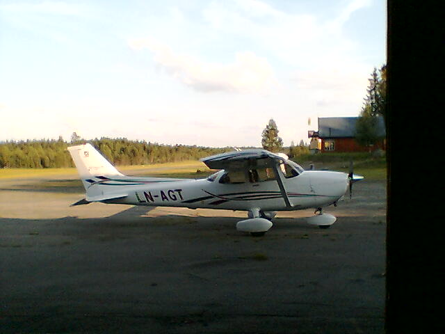 Cessna 172 LN-AGT Reinsvoll ENRV